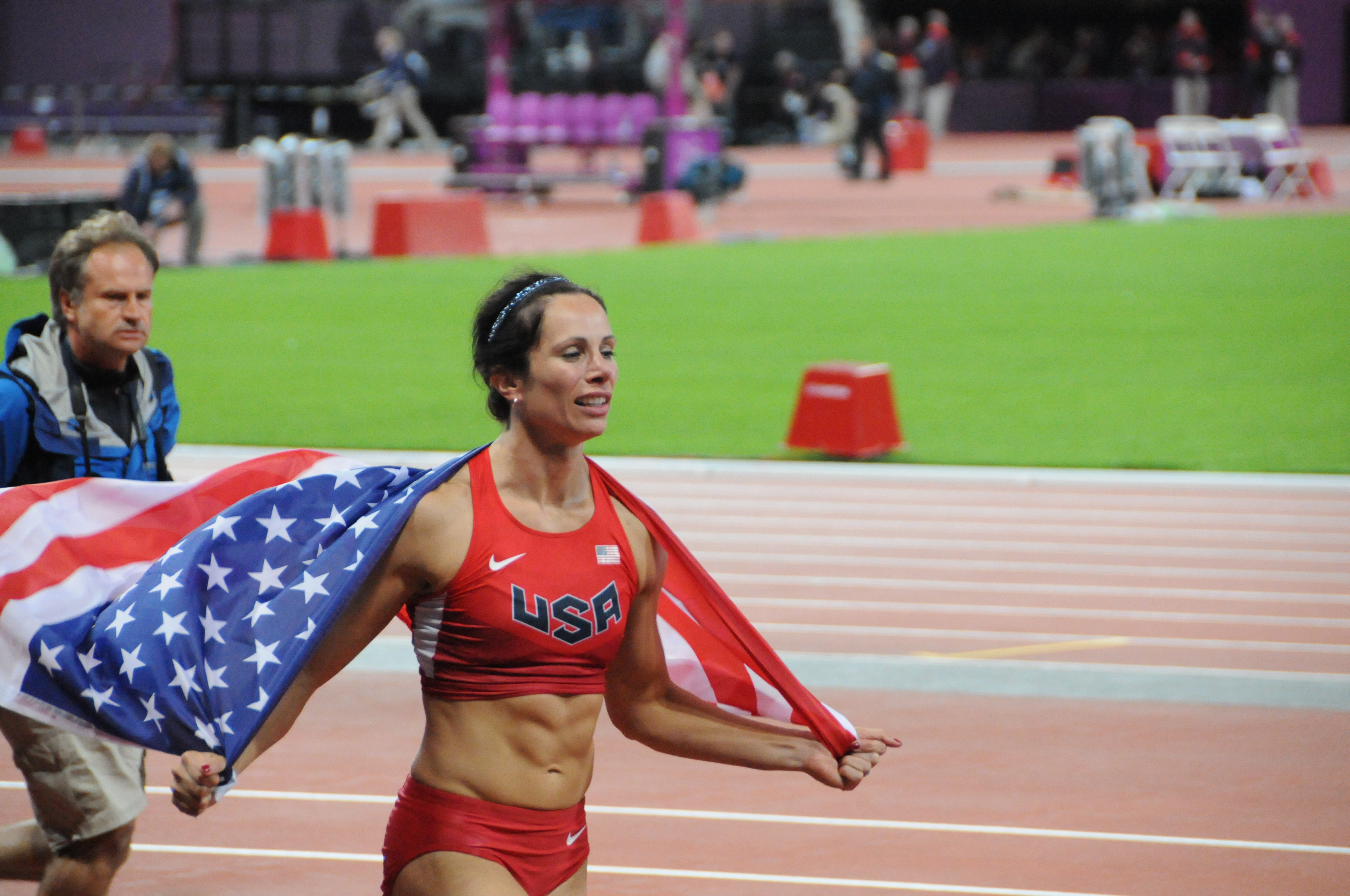 L'américaine Jennifer Suhr: médaille d'or olympique du saut à la perche à Londres